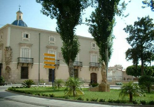 Fachada lateral del Ayuntamiento de Orihuela